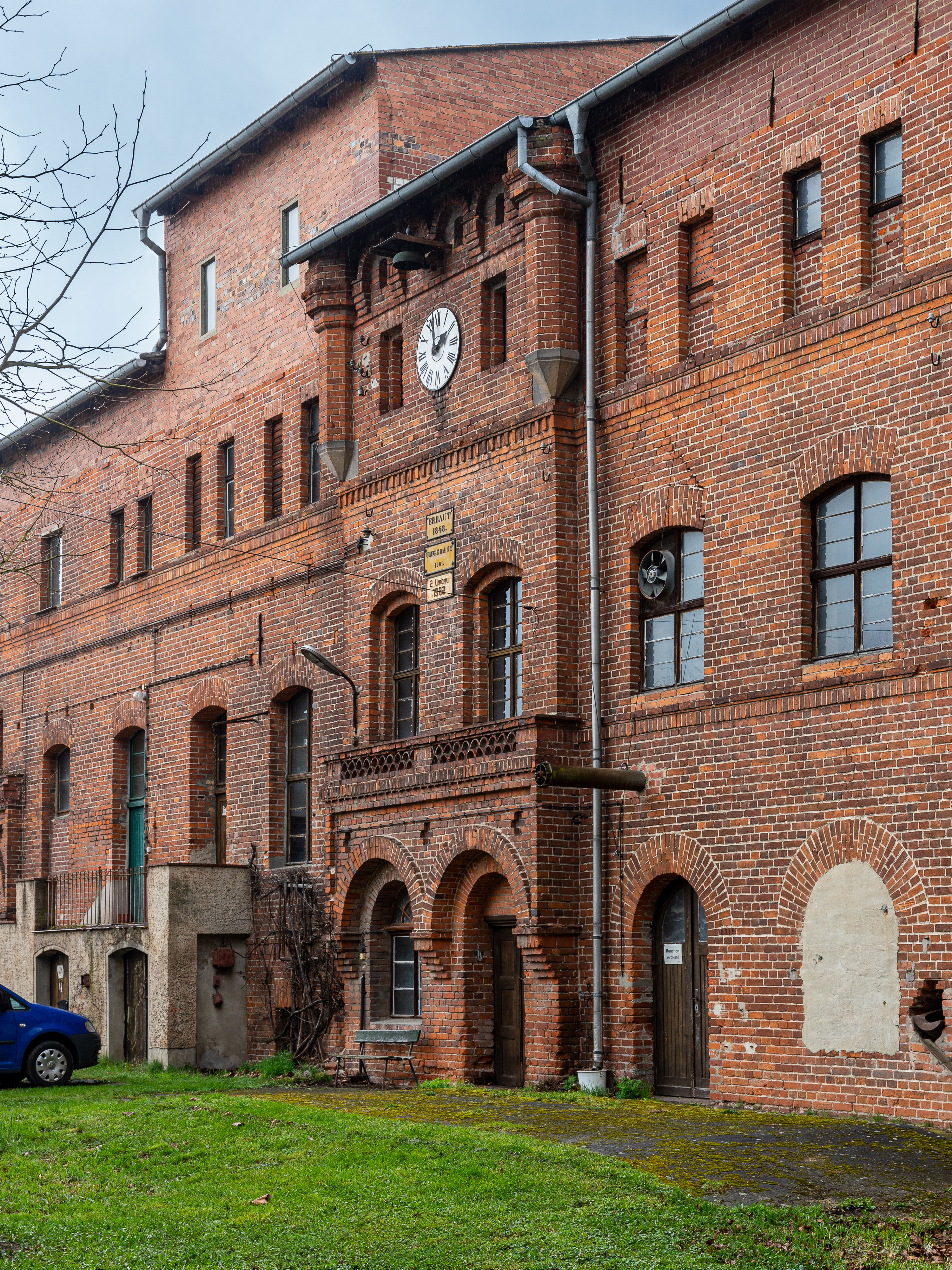 Ehem. Brennerei des Guts Pretschen